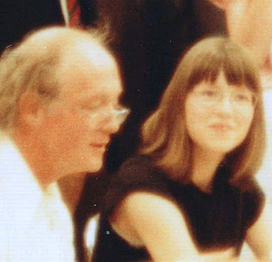 Ulrich Wildgruber mit Tochter 1985 in Hamburg bei einem Simultanspiel des späteren Schachweltmeisters Garry Kasparov, eine Veranstaltung des Nachrichtenmagazins Der Spiegel.